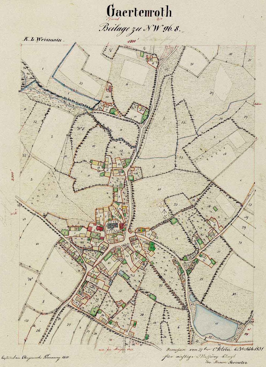 Ortsplan von Gärtenroth, M 1:2500